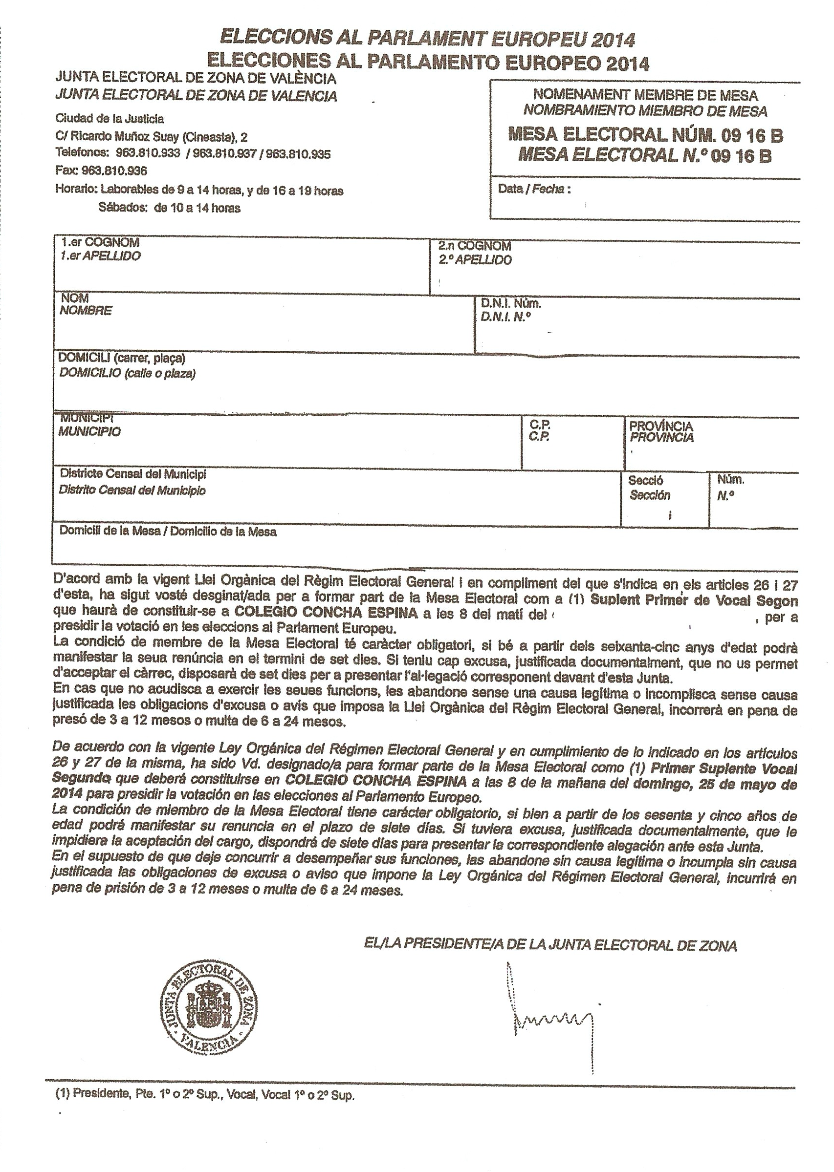 Nombramiento de miembro de mesa electoral, este caso de primer suplente del segundo vocal, para las elecciones europeas de 2014. Al tratarse de una comunidad bilingüe, las expresiones figuran en castellano y valenciano.